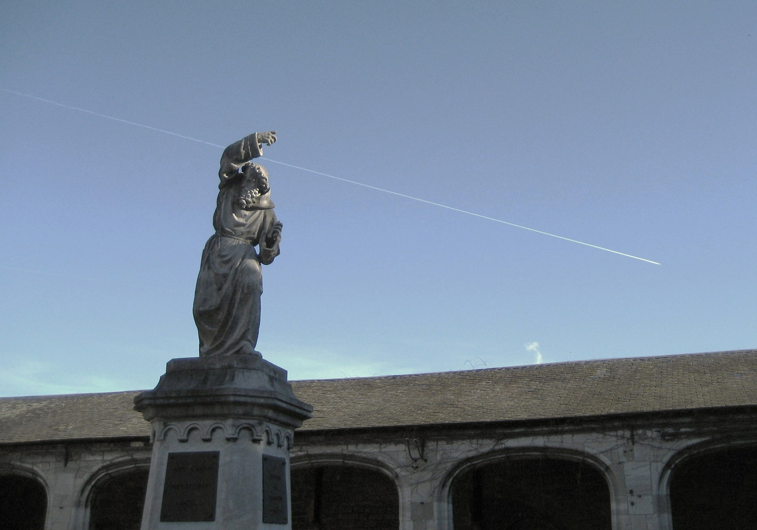 Statue de l'apôtre de la première croisade sur le site de l'Abbaye de Neufmoustier à Huy.